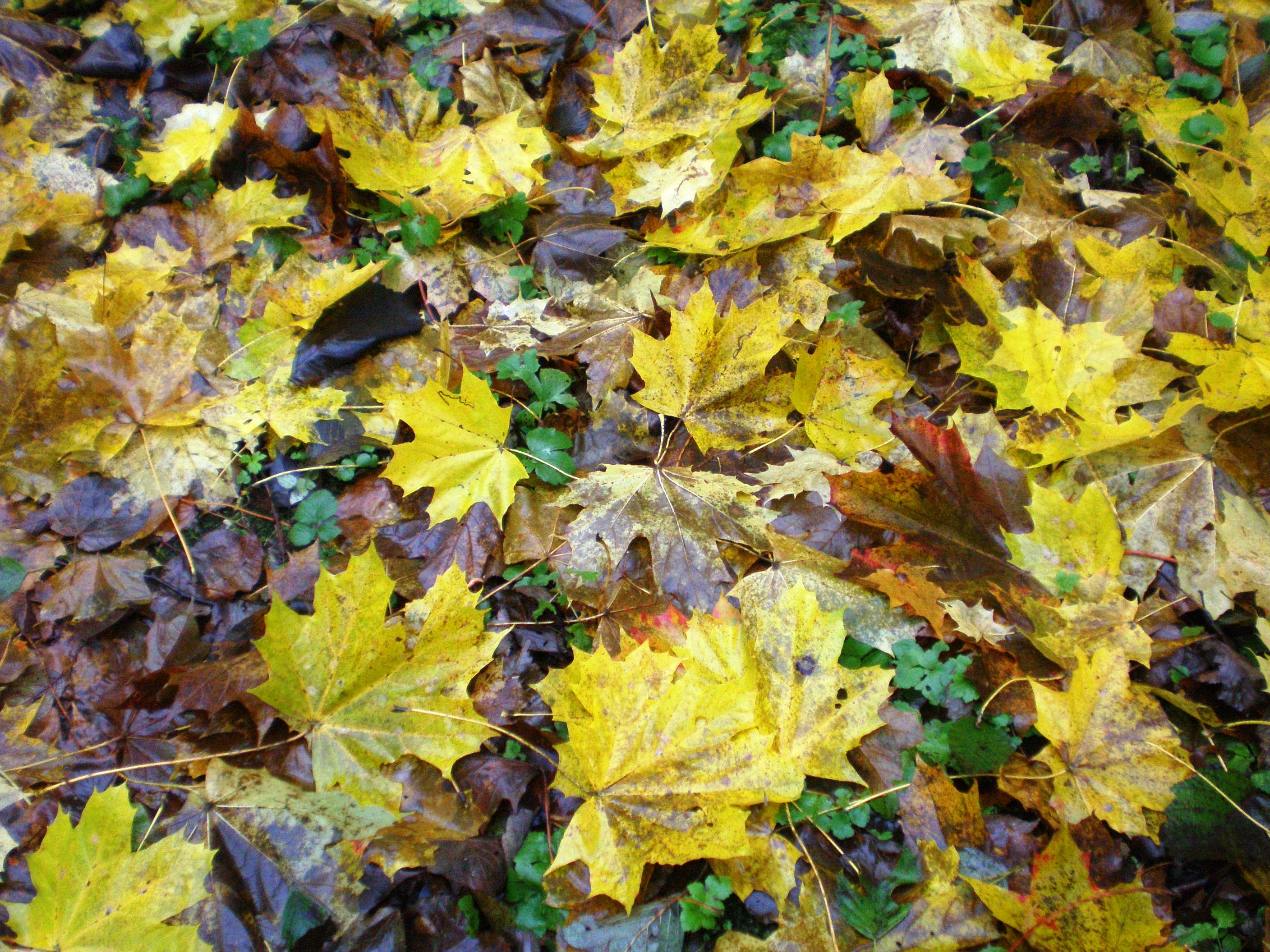 Nukritę klevo lapai. Jiesios draustinis. Kaunas